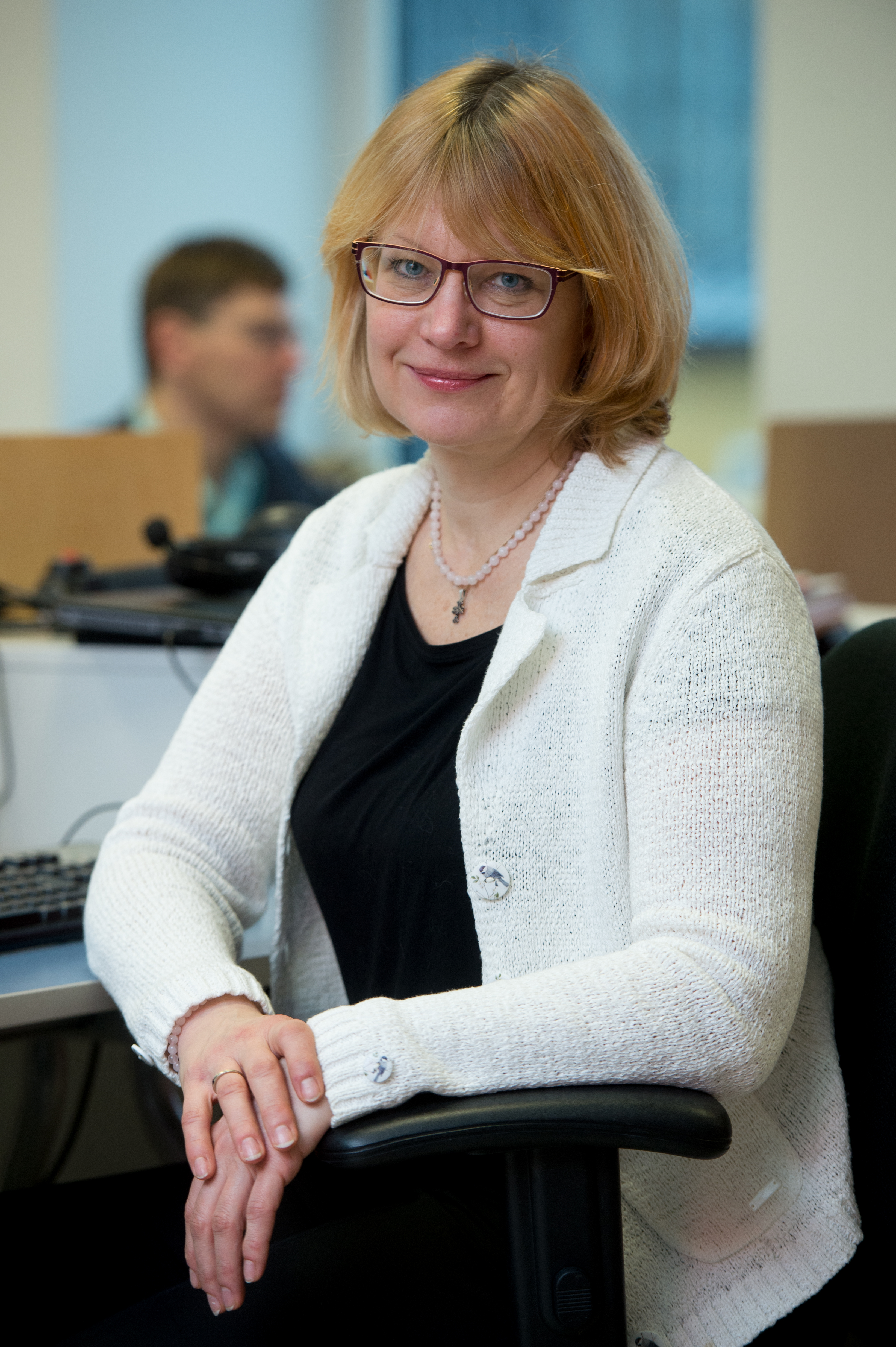 Tiina Jõgeda